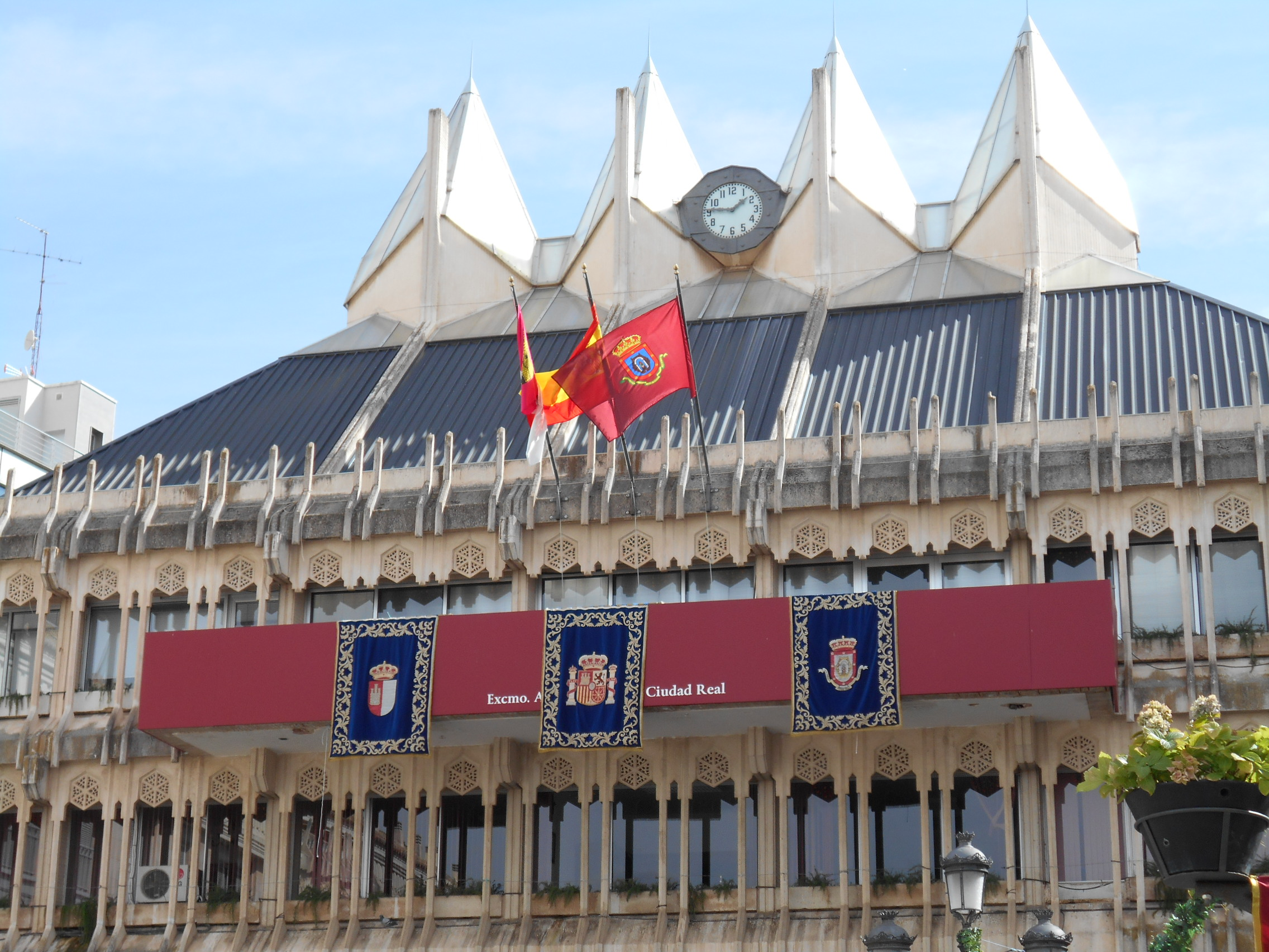 Sede del Gobierno municipal